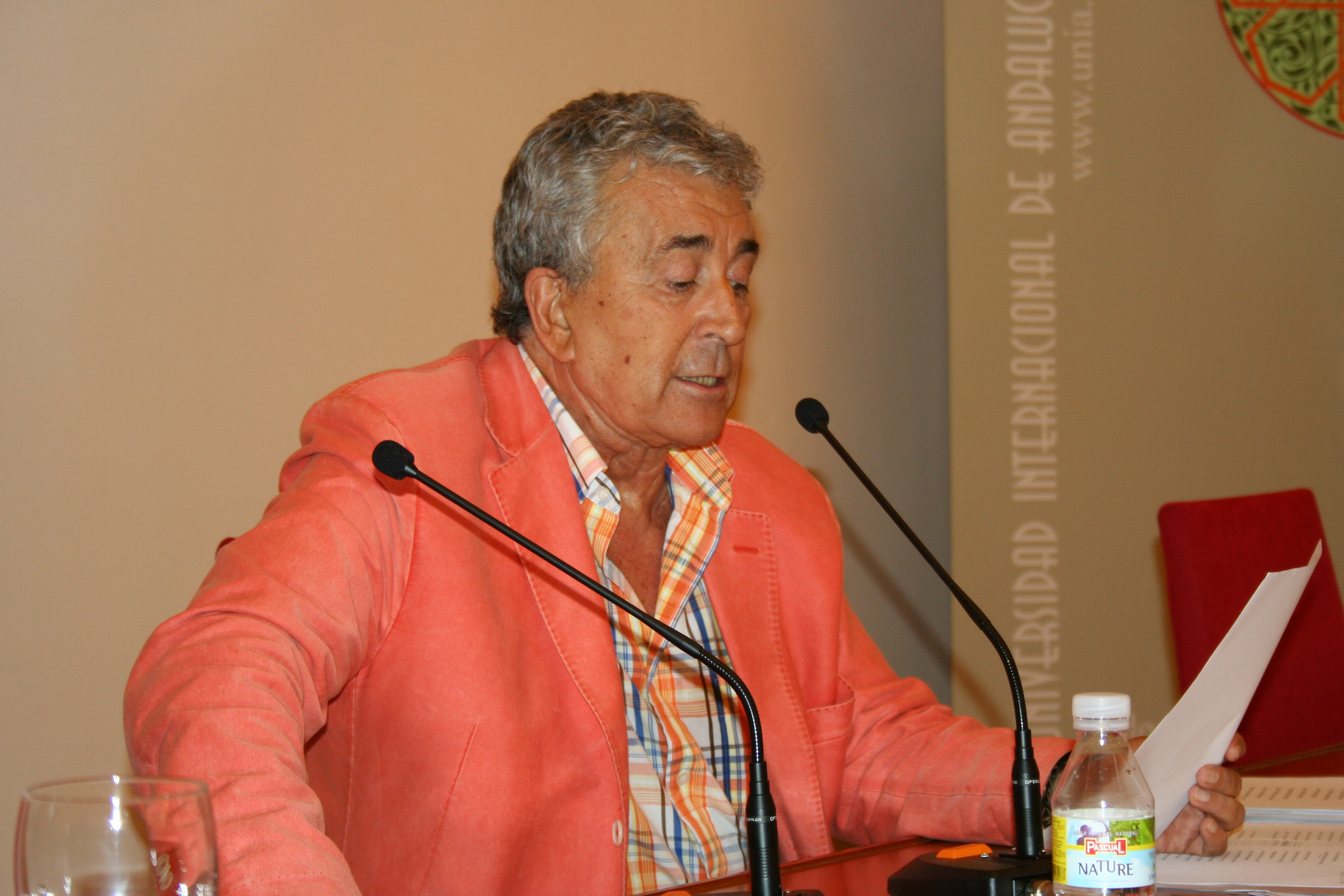 Clase magistral de Paco Valladares en la Escuela de Teatro de los cursos de verano de la Universidad Internacional de Andalucía (sede Antonio Machado de Baeza).